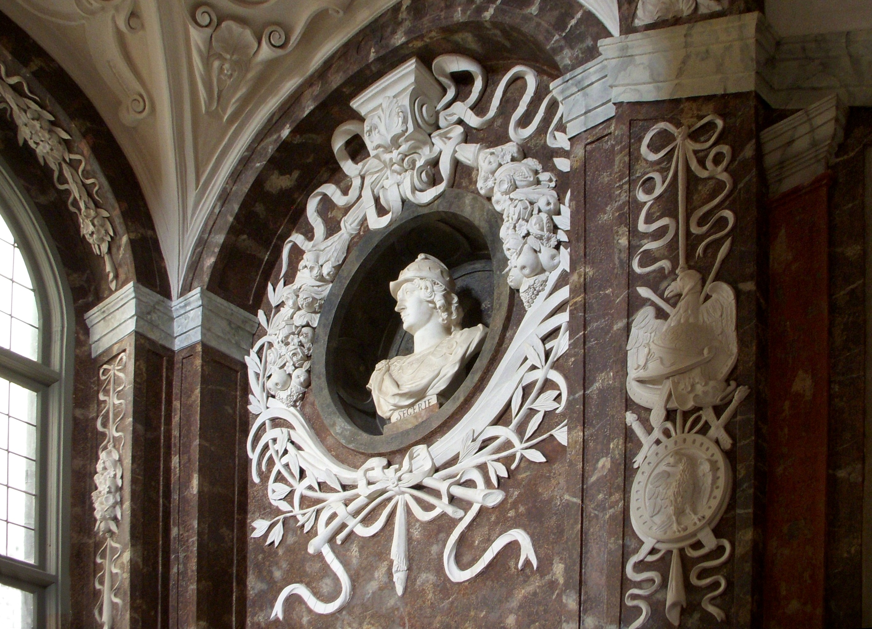 Drottningholms slott huvudtrappa, bottenvåning, norra trapplopp, byst av Nicolaes Millich